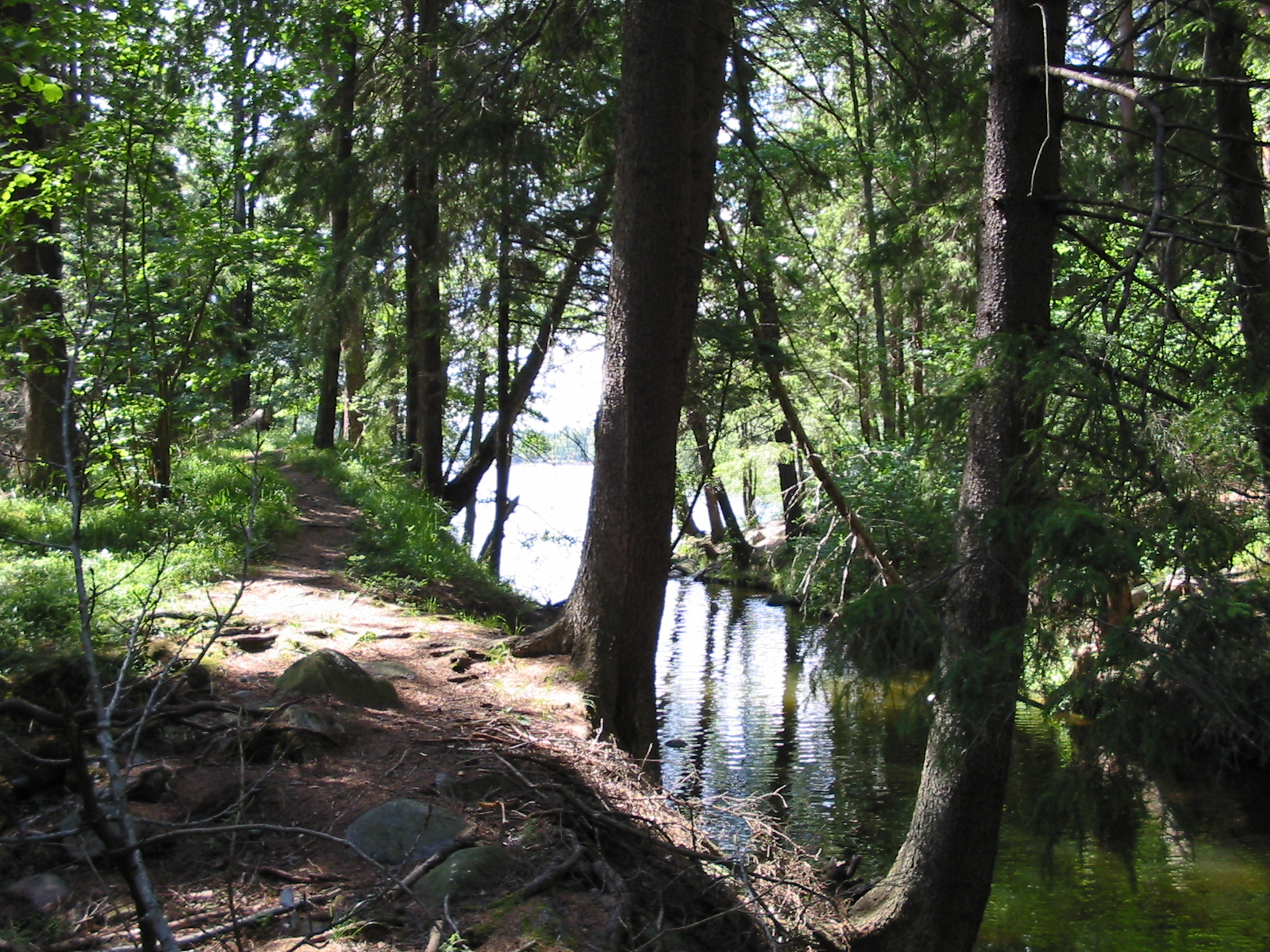 Stream Gammelströmmen, Tyresö, Sweden. Inlet of stream — outlet of lake Långsjön (Skälsätra-Tutviken).